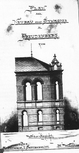 Plan der ehemaligen Synagoge in Freudenberg (Baden) im Main-Tauber-Kreis (Baden-Württemberg) aus dem Jahr 1891